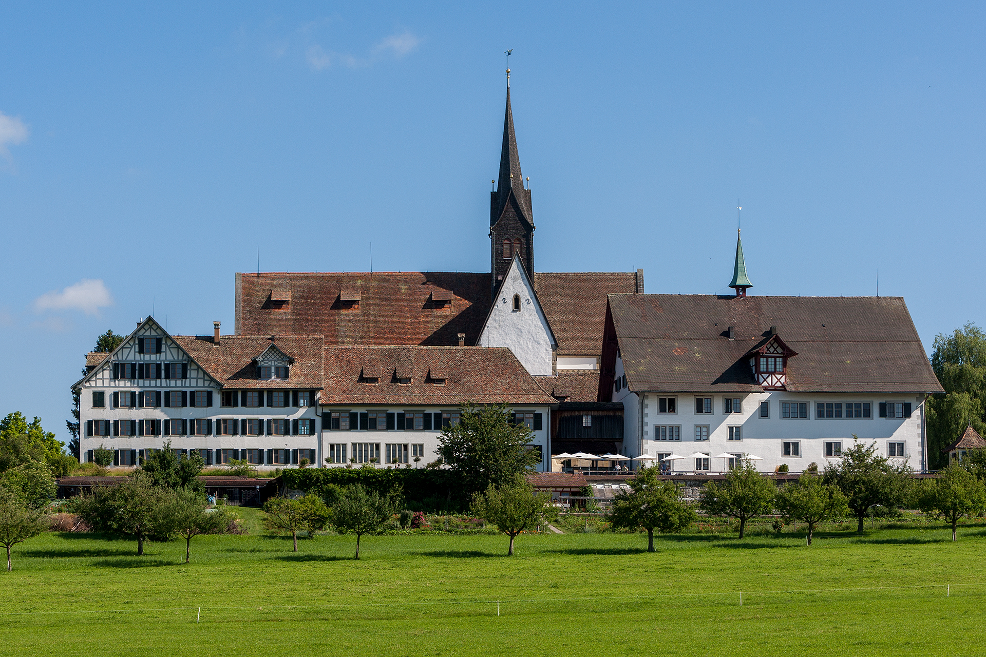 Kloster Kappel in Kappel (ZH)